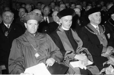 500 Jahre Universität Freiburg: Prof. von Caemmerer und Welte